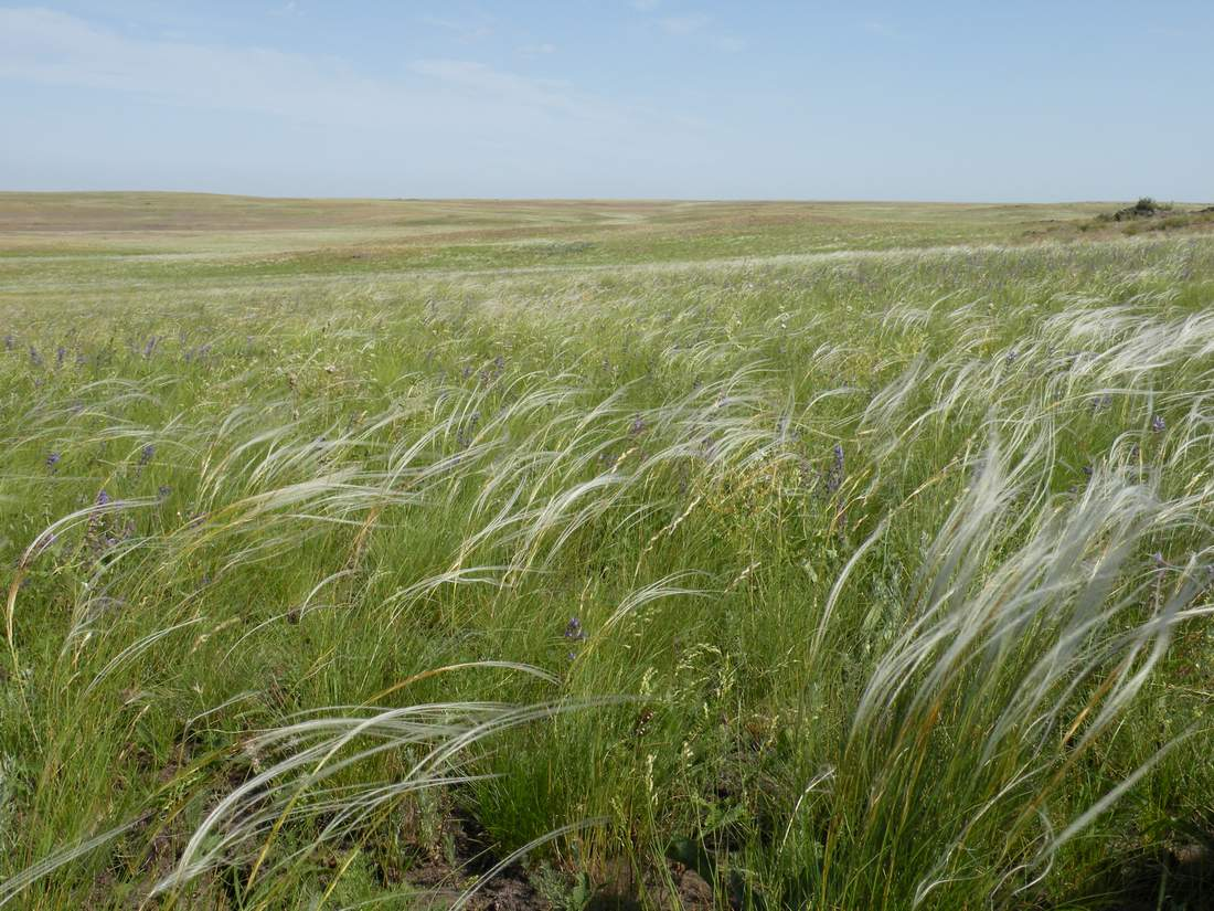 Настоящая разнотравно-дерновиннозлаково-красноковыльная степь в Адамовском районе Оренбургской области. Аспект цветущих ковыля Залесского (Stipa zalesskii) и шалфея степного (Salvia stepposa)